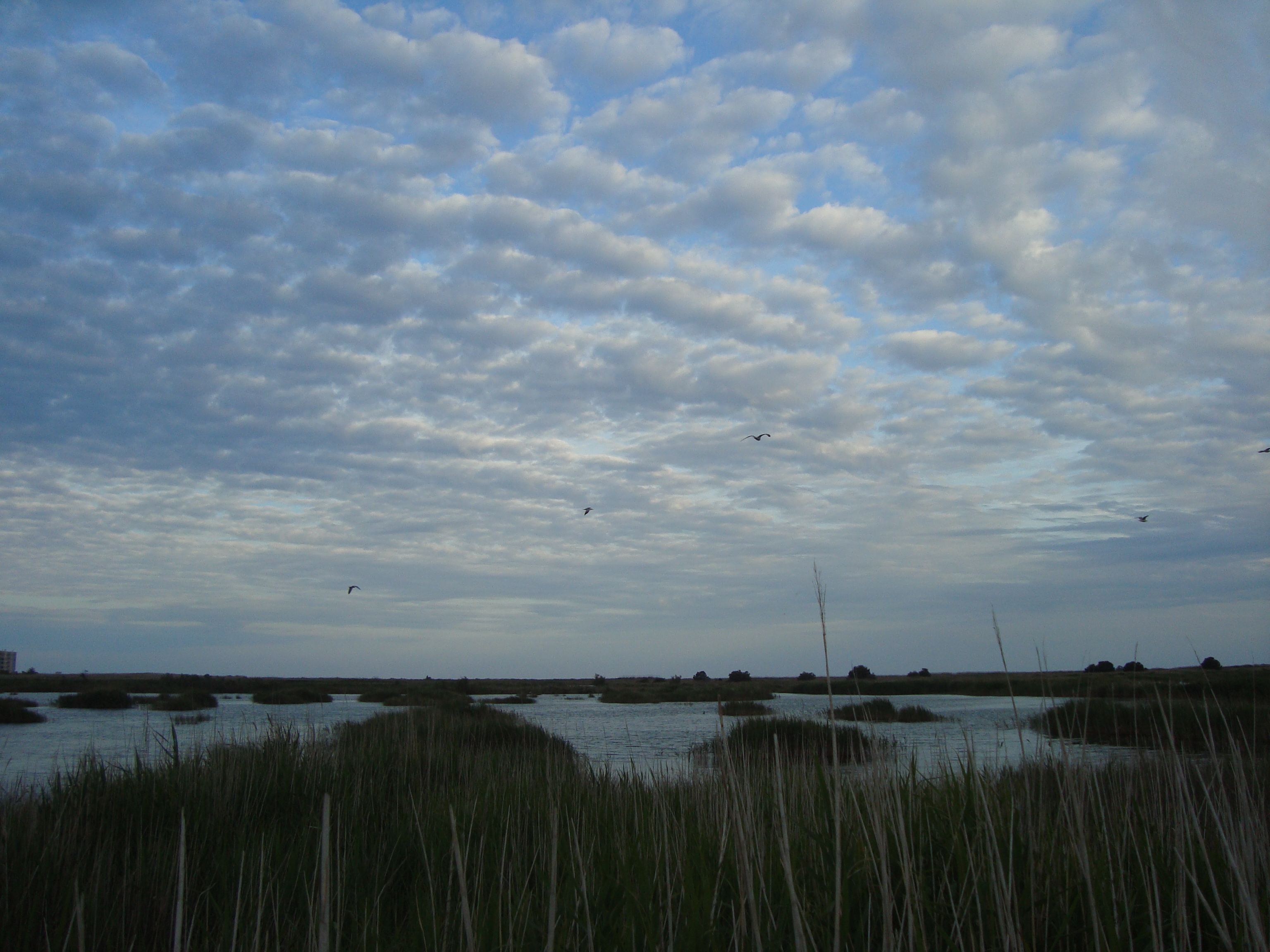 Parc Natural del Prat de Cabanes i Torreblanca This is a photography of a Special Area of Conservation in Spain with the ID: ES0000060. Natura2000 entry, EEA entry